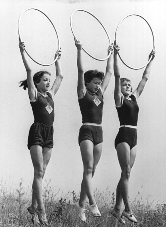 Leipzig, Zentralstadion, Reifen-Übung Zentralbild Wlocka 13.7.1957 Vorbereitung für das Turn- und sporttreffen der Jugend in Leipzig. Cirka 1000 Kinder bereiten sich gegenwärtig auf der Festwiese des Zentralstadions in Leipzig auf die Vorführung der Massenübungen der Kinder vor. Die Leitung der Übung hat die Verdiente Meisterin des Sports, Blanke, von der Kinder- und Jugendsportschule. Die Kinder sind aus sämtlichen Grundschulen Leipzigs zusammengezogen. UBz: Ausschnitt aus der Reifenübung.